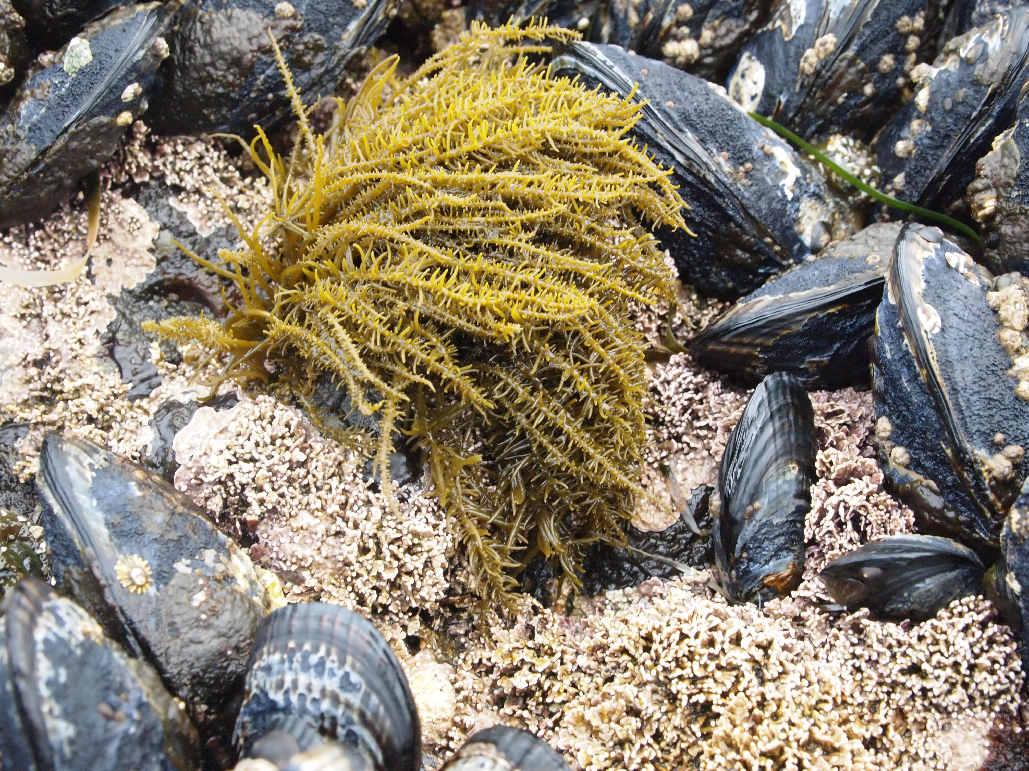 Analipus japonicus